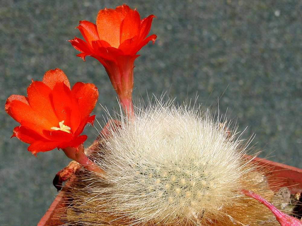 Rebutia fiebrigii (Rebutia albipilosa) - cultivated plant from own collection.